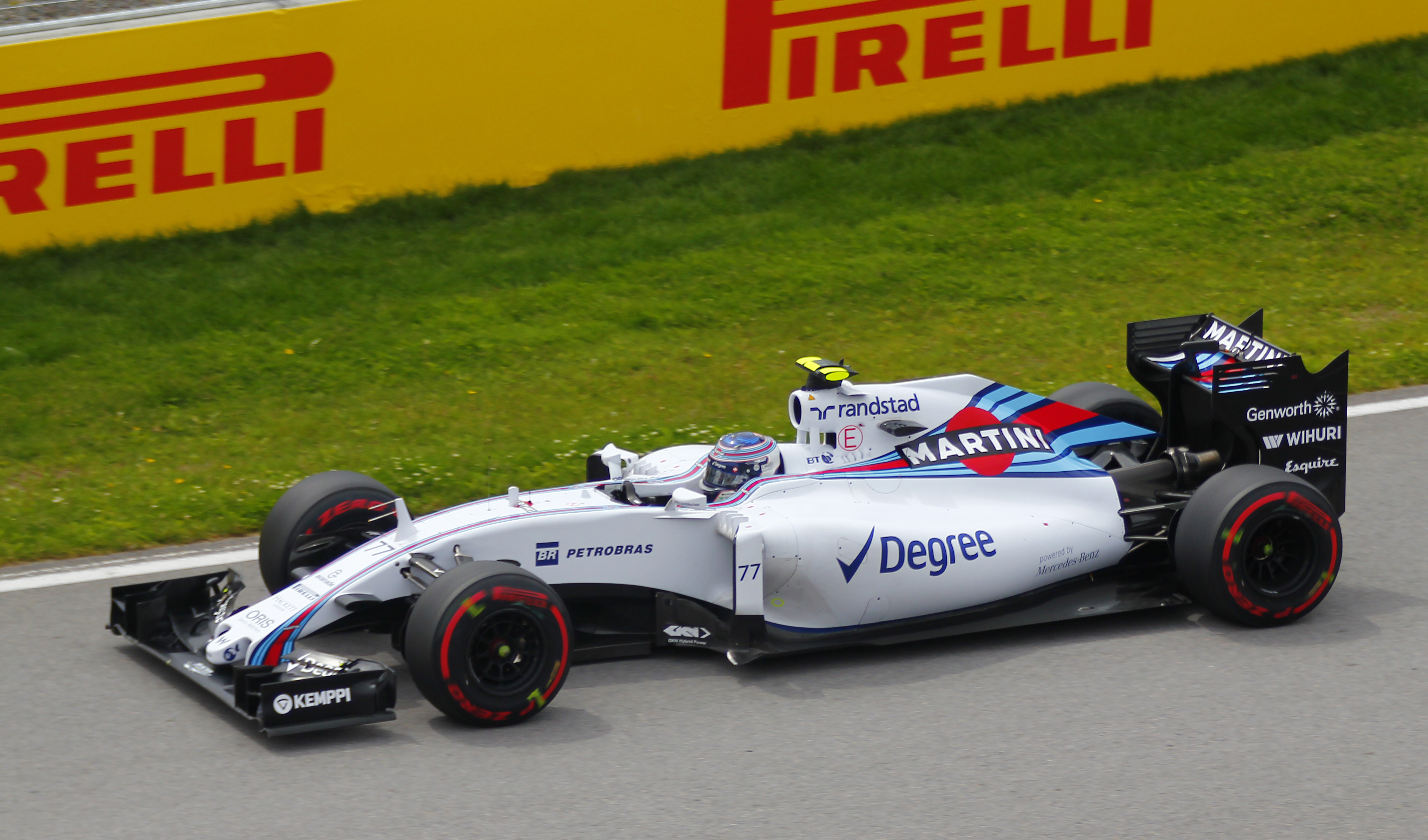 Valtteri Bottas - Williams F1 Team - Grand Prix du Canada - Circuit Gilles-Villeneuve - 7 juin 2015 (Photo Paul-Émile Poulin-Jacques)